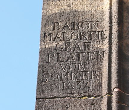 Inschrift des jungen Grafen am Dom zu Strassburg auf der oberen Aussichtsplattform.